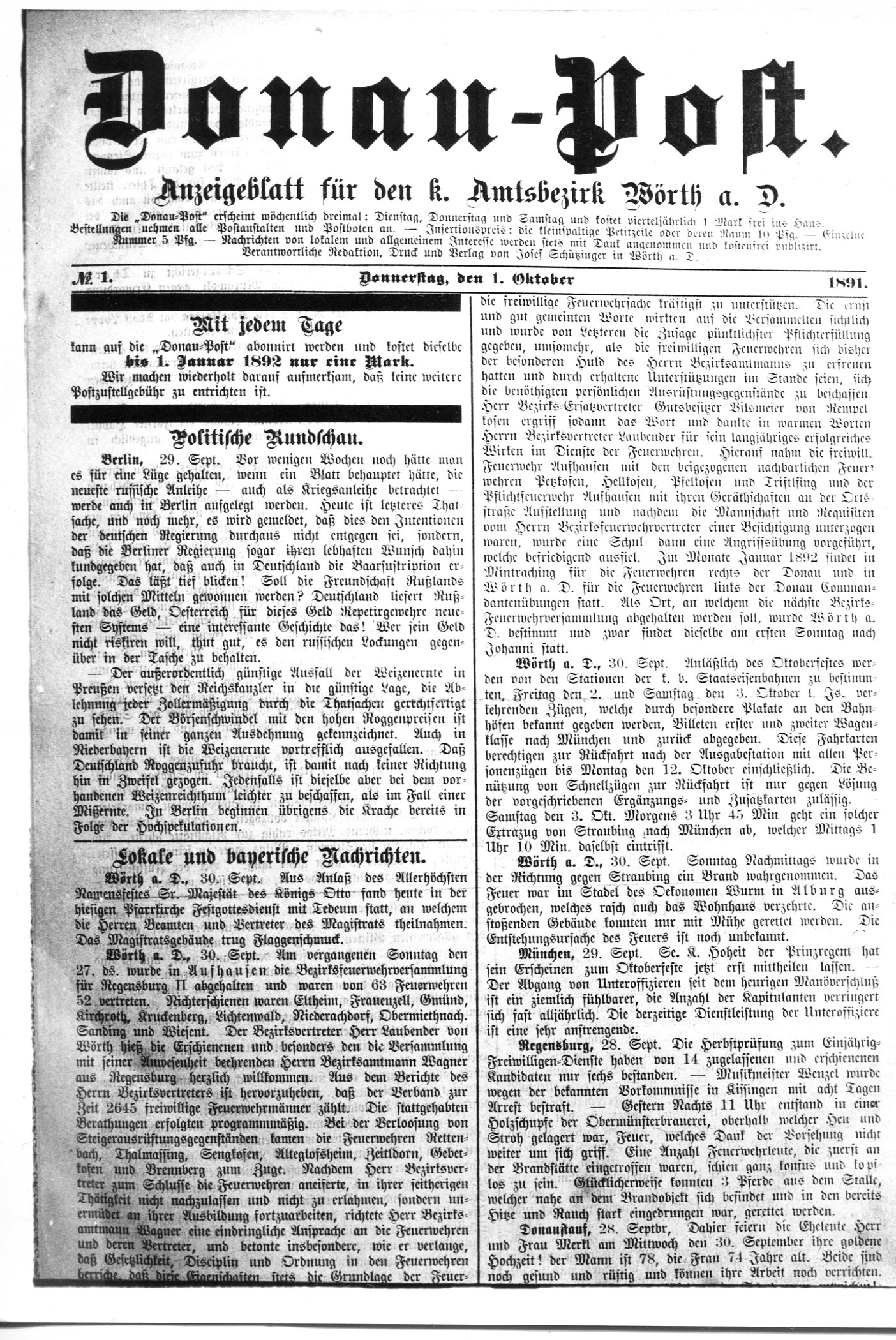 Erstausgabe Donau-Post Wörth Donau